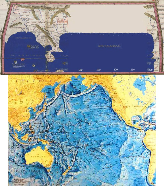 Sinus Magnus como Oceano Pacífico en Marino deTiro y en la realidad